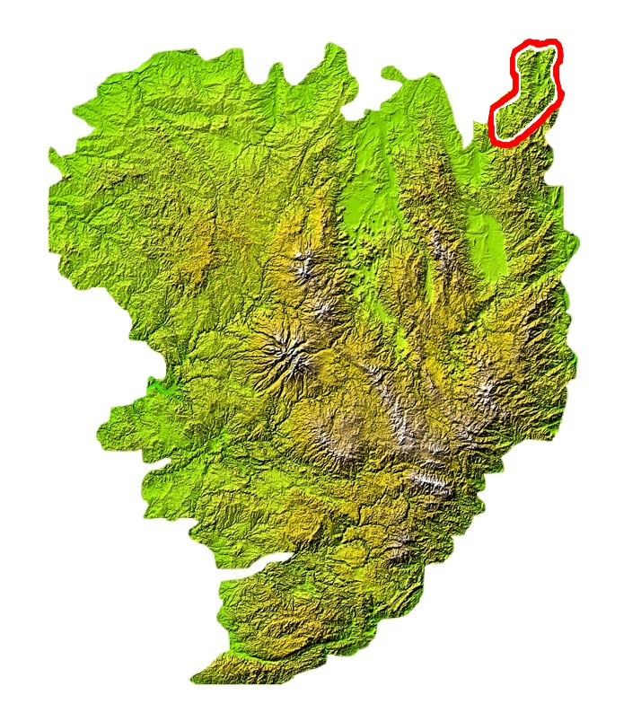 Situation des Monts du Maconnais sur la carte du Massif central